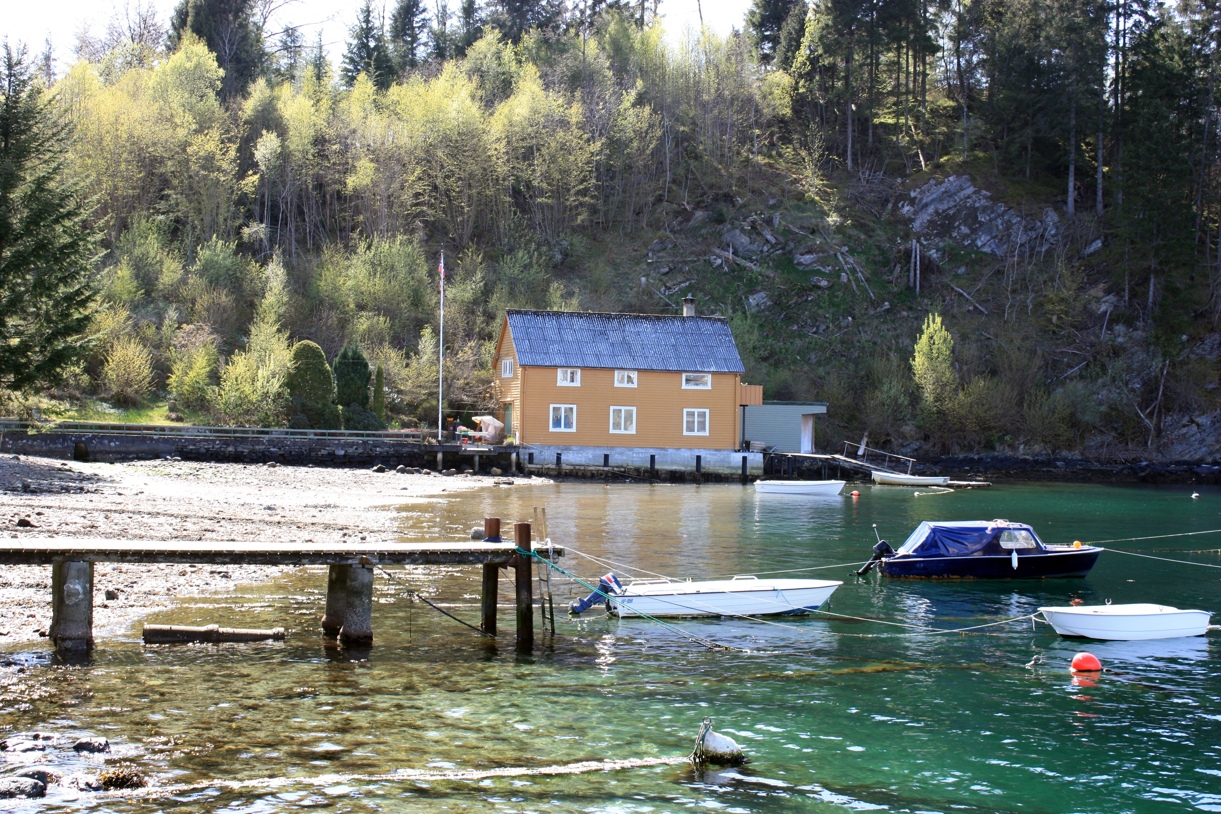 Salbu, Fana, Bergen, at Fanafjorden